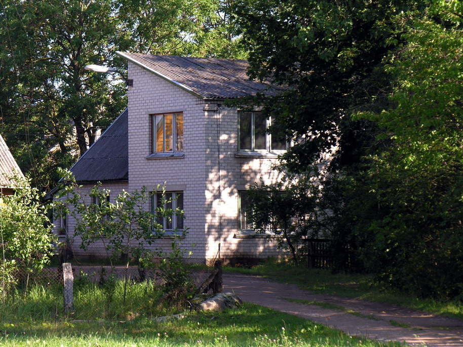 Stočkai, Mažeikių rajonas, Viekšnių seniūnija Beveik ištuštėjęs Stočkų kaimas Foto: Algirdas, 2006 m. rugpjūčio 20 d., Lietuva